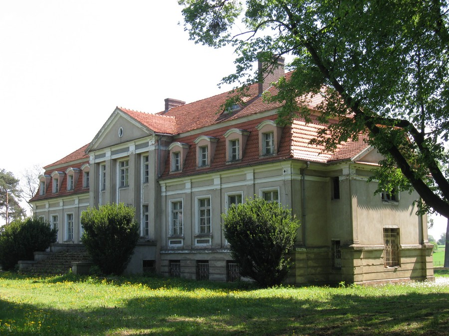 Chocicza - pałac